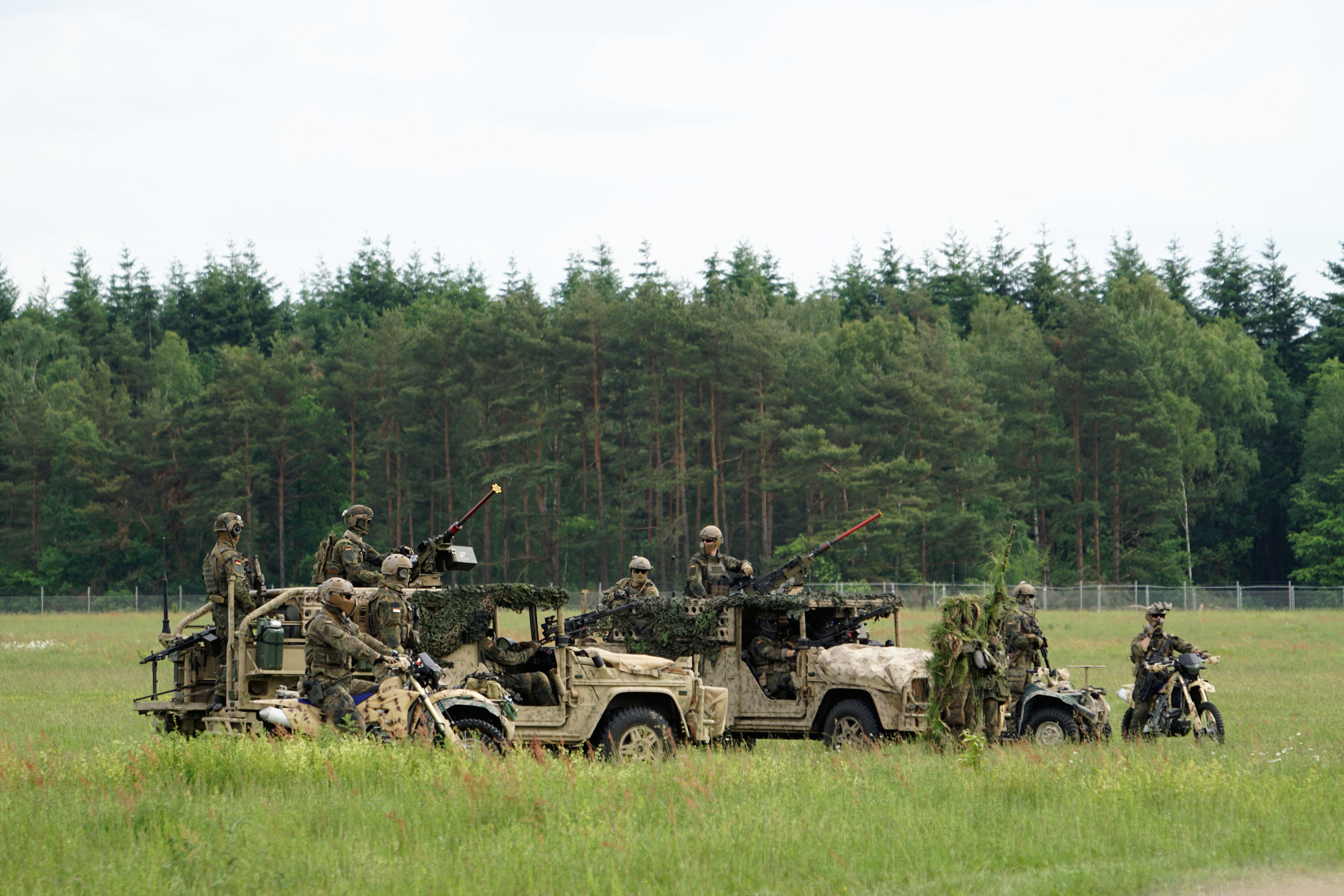 Aufgenommen am Tag der Bundeswehr 2017 auf dem Heeresflugplatz Faßberg.